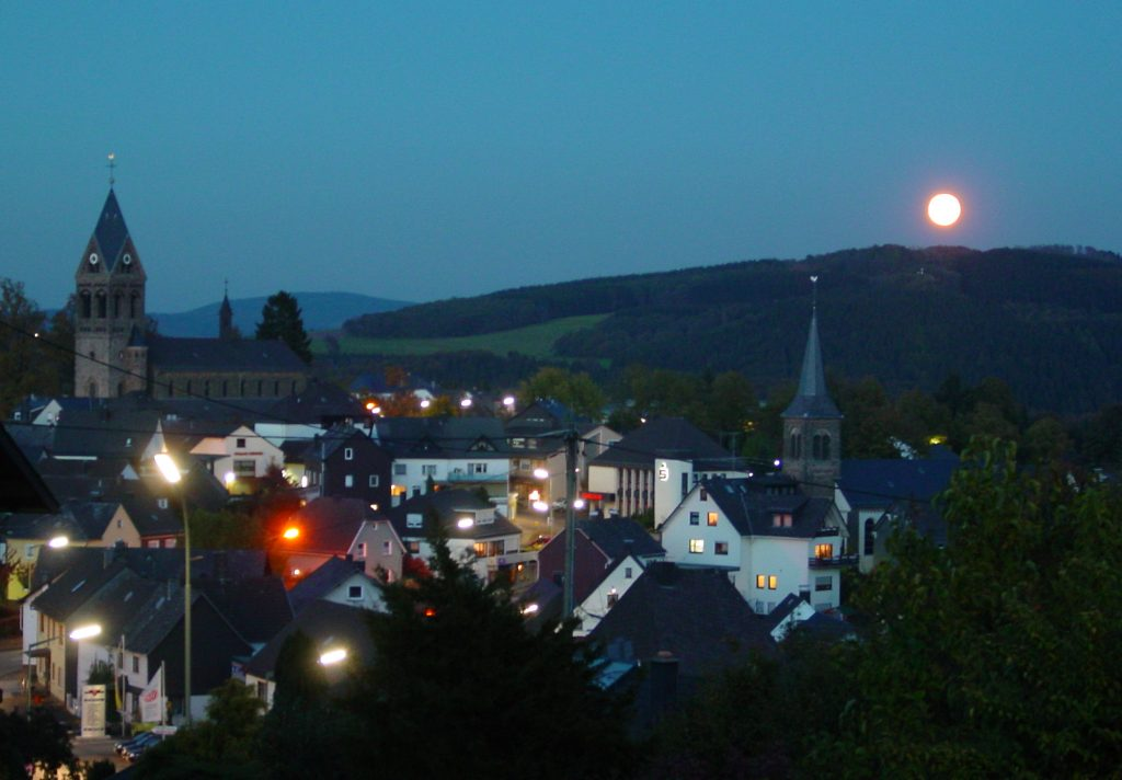 D57580 Gebhardshain; Blick nach Nordost mit aufgehendem Vollmond